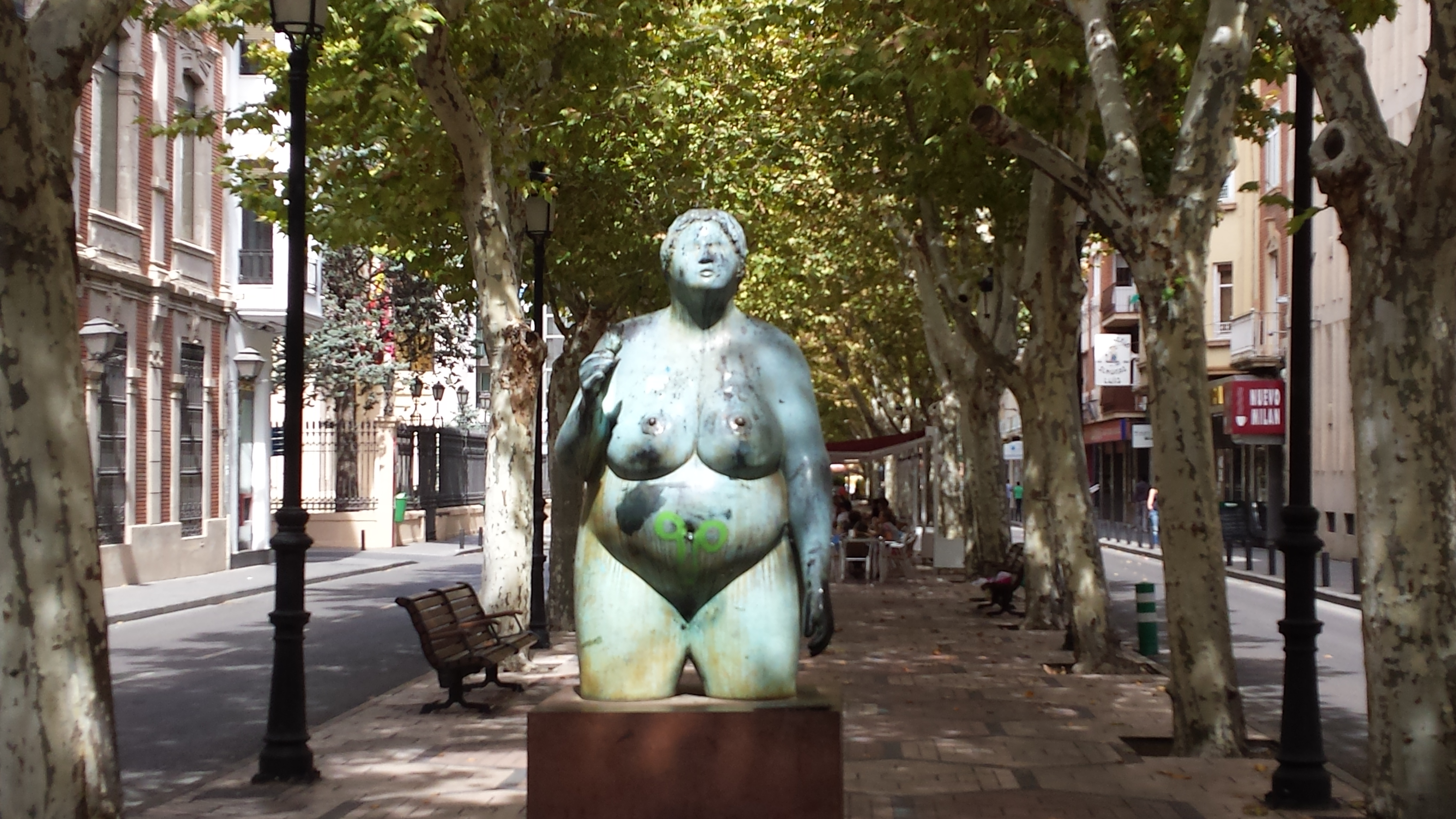 La Nudista. Paseo de la Libertad. Centro. Albacete